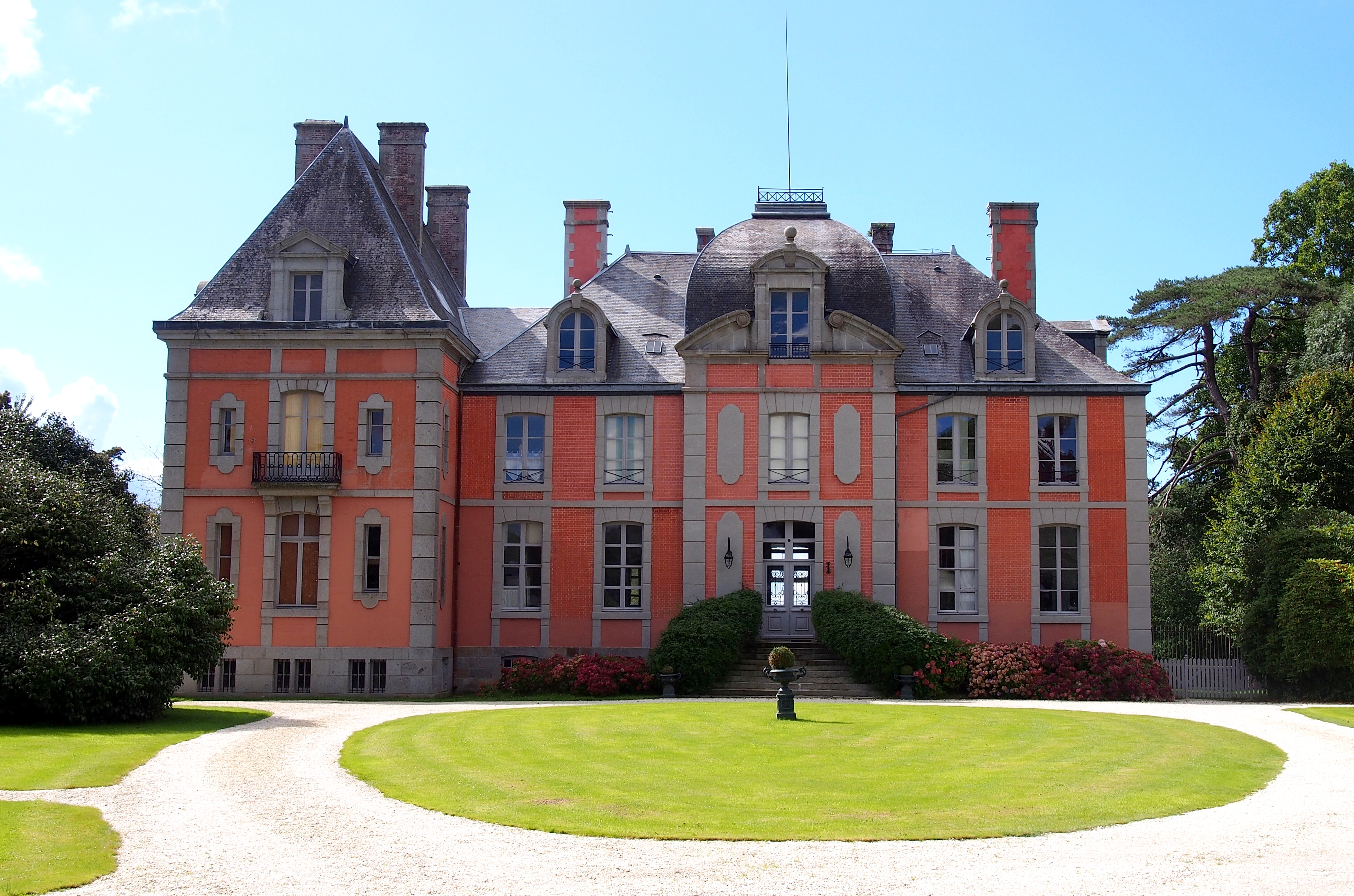 Bacilly (Normandie, France). Le château de Chantore.